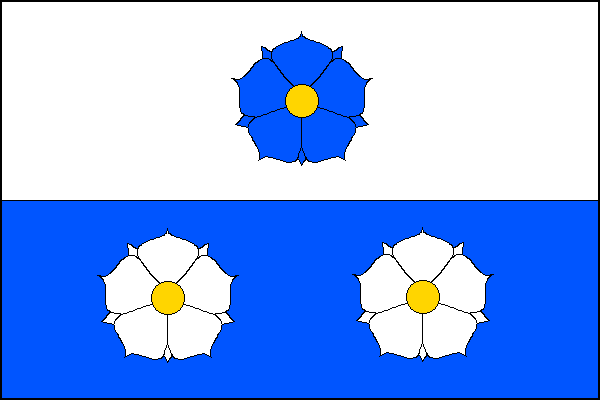 vlajka,Lazníky ,okres Přerov